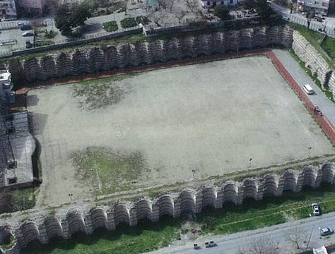 Fildamı